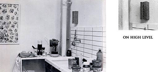 Aus der Serie: Kool Killer Objekt - Dingbild für unpopuläre Orte